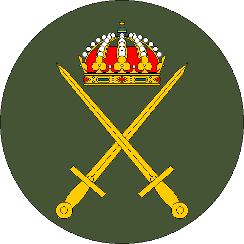 Ovanför Försvarets materielverks (FMV)s entrédörr sitter 3 vapensköldar som står för marinen (vänster), armen (mitten) och flygvapnet (höger). Denna bild är en tolkning av armens sköld baserad på ett lågkvalitetsfoto och skaparens egna minne.